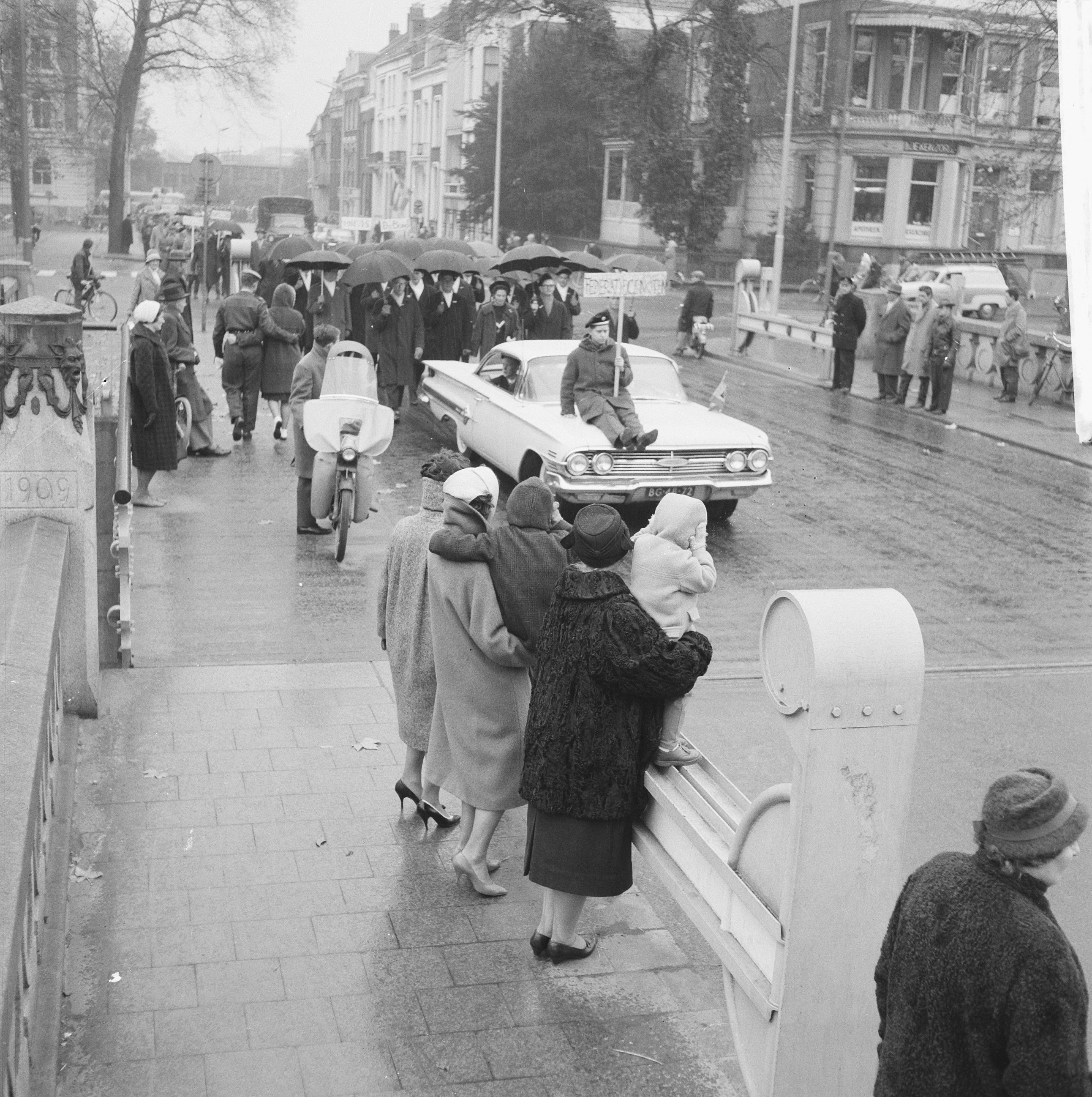 Collectie / Archief : Fotocollectie Anefo Reportage / Serie : [ onbekend ] Beschrijving : Vijftigjarig bestaan van de Studentenvereniging Unitas . Optocht van reunisten Datum : 23 november 1961 Trefwoorden : optochten, reunisten, studenten Instellingsnaam : Unitas Fotograaf : Lindeboom, Henk / Anefo Auteursrechthebbende : Nationaal Archief Materiaalsoort : Negatief (zwart/wit) Nummer archiefinventaris : bekijk toegang 2.24.01.03 Bestanddeelnummer : 934-6366